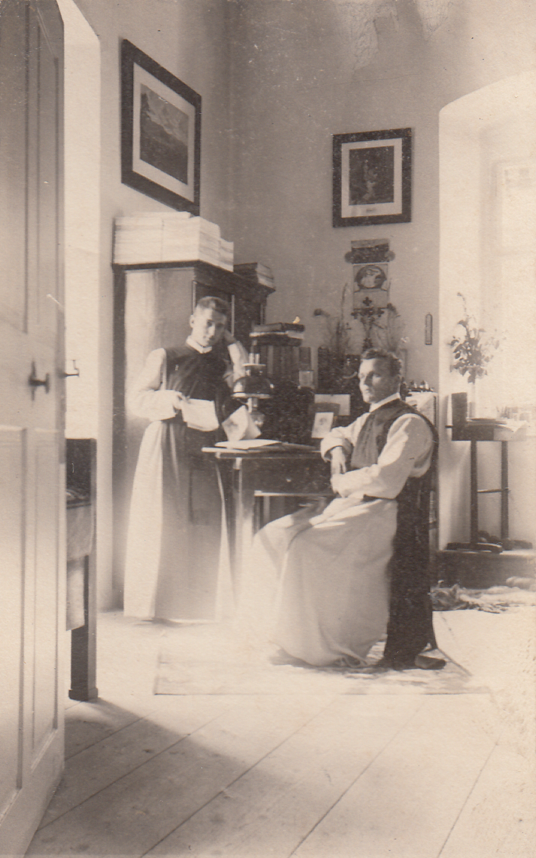 Zwei junge Zisterzienser im Stift Heiligenkreuz (Niederösterreich) vor 1903. Links ist Frater Alberich Rabensteiner, rechts Godfried Welz